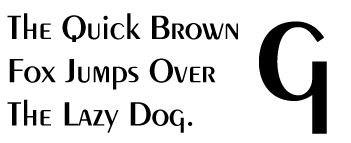 Imagen de la tipografía Peignot